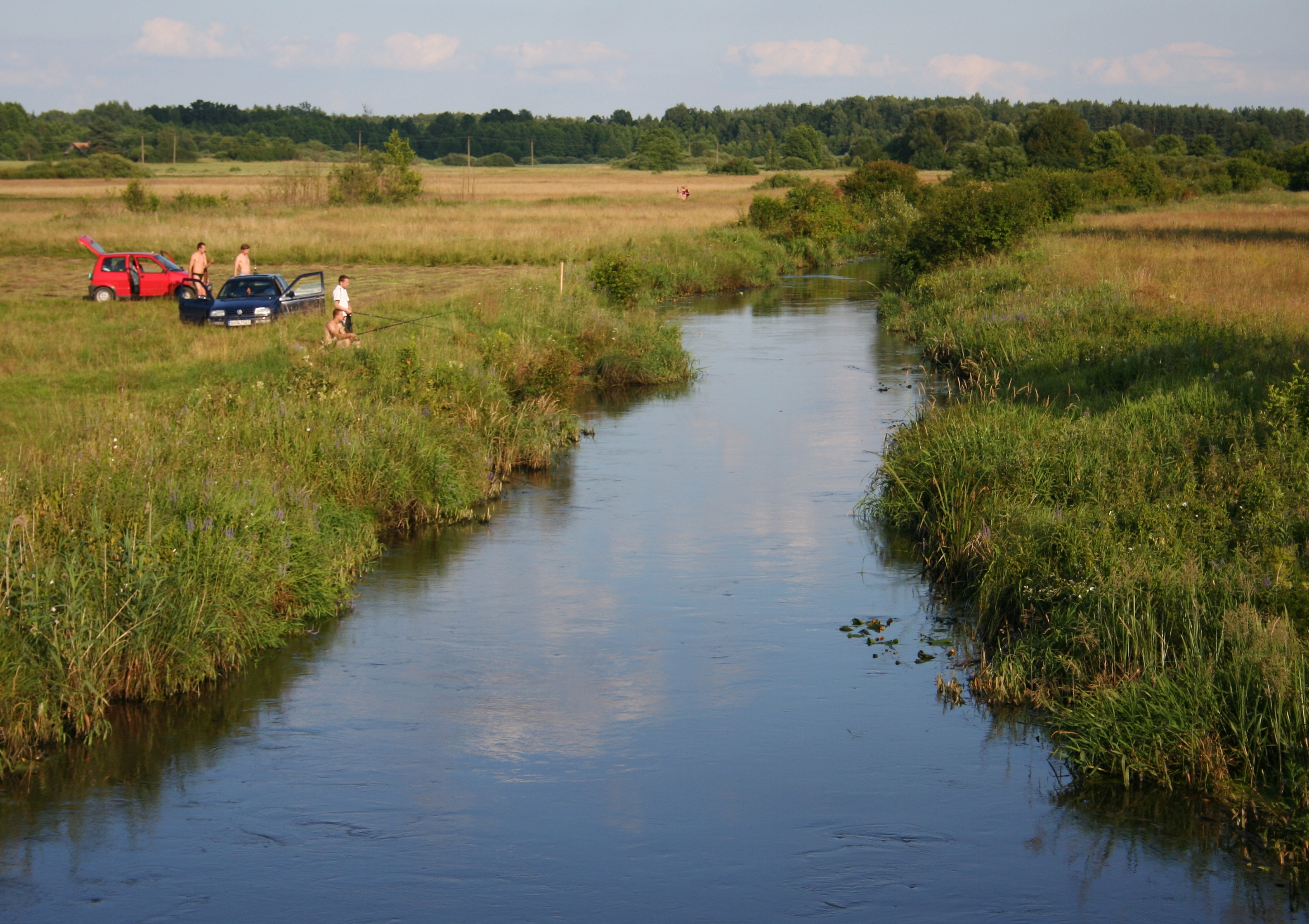 Rzeka Narewka przepływająca w pobliżu miejscowości Podlewkowie, woj. podlaskie